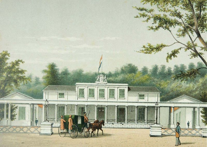 Litho. Litho naar een oorspronkelijke aquarel van Rappard. Het paleis van de gouverneur-generaal in Rijswijk, Batavia